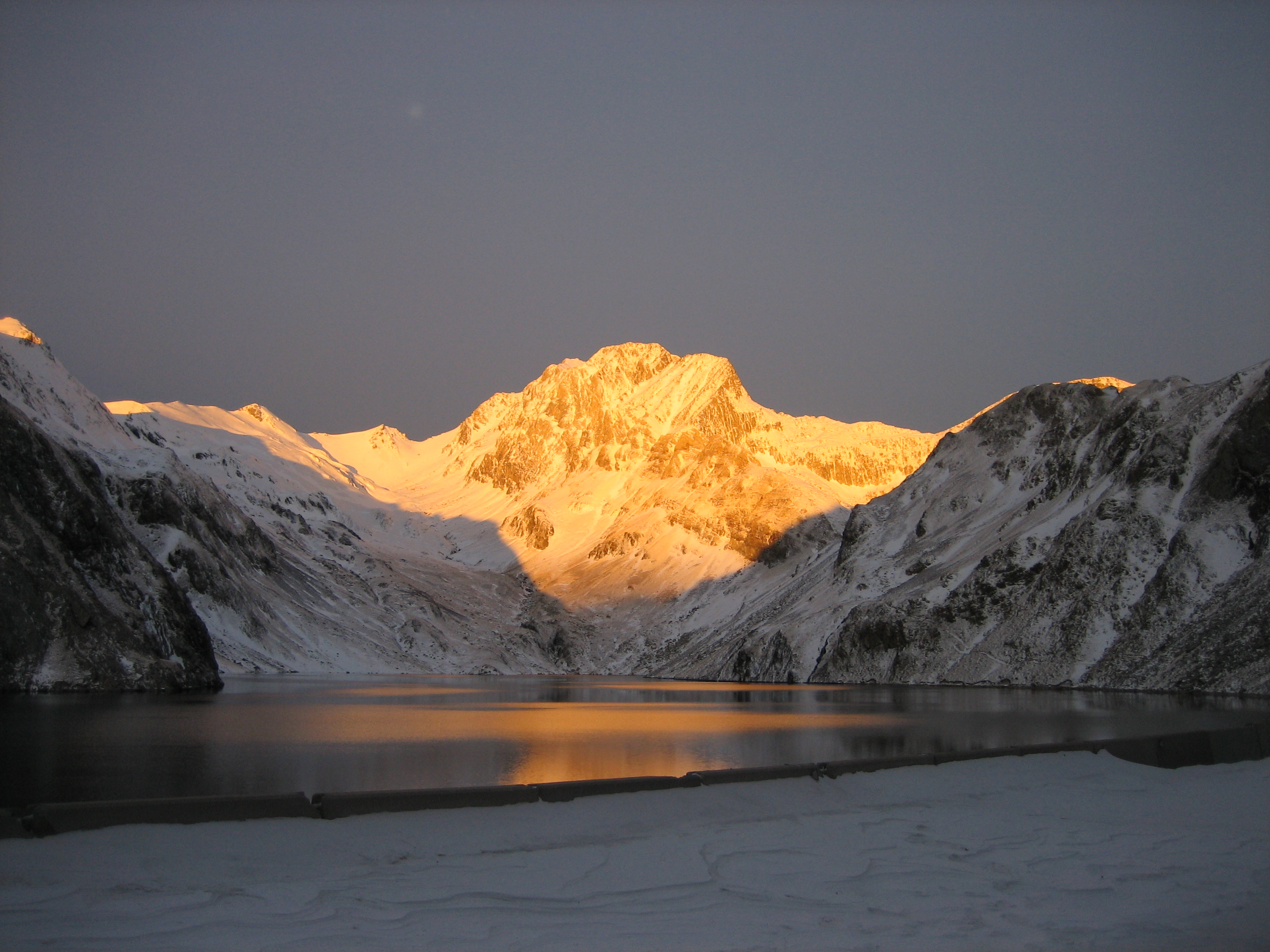 Vallibierna peak at sunrise from Llauset reservoir